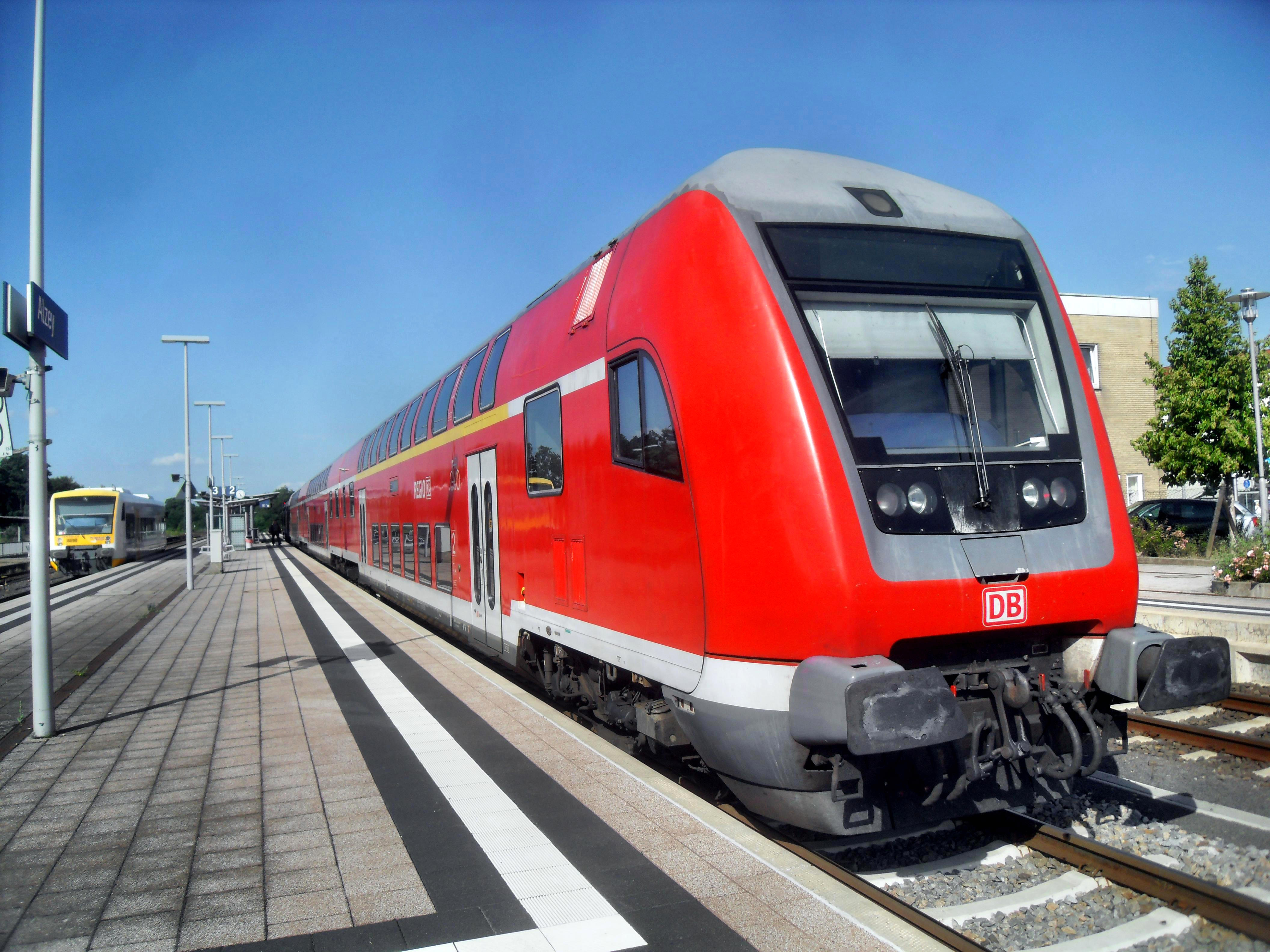 Regionalbahn (Doppelstockwagen) im Alzeyer Bahnhof in Rheinhessen (Deutschland) auf dem Weg nach Bingen am Rhein